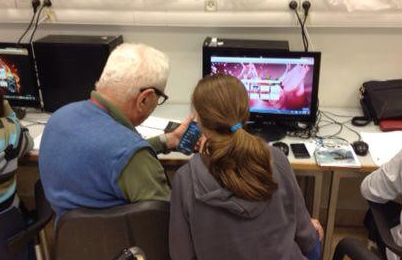 שיעור "סבתא ברשת" בחט"ב אורט שלומי, בו תלמידים מדריכים קשישים על שימוש במחשב, במסגרת "אורטוב"